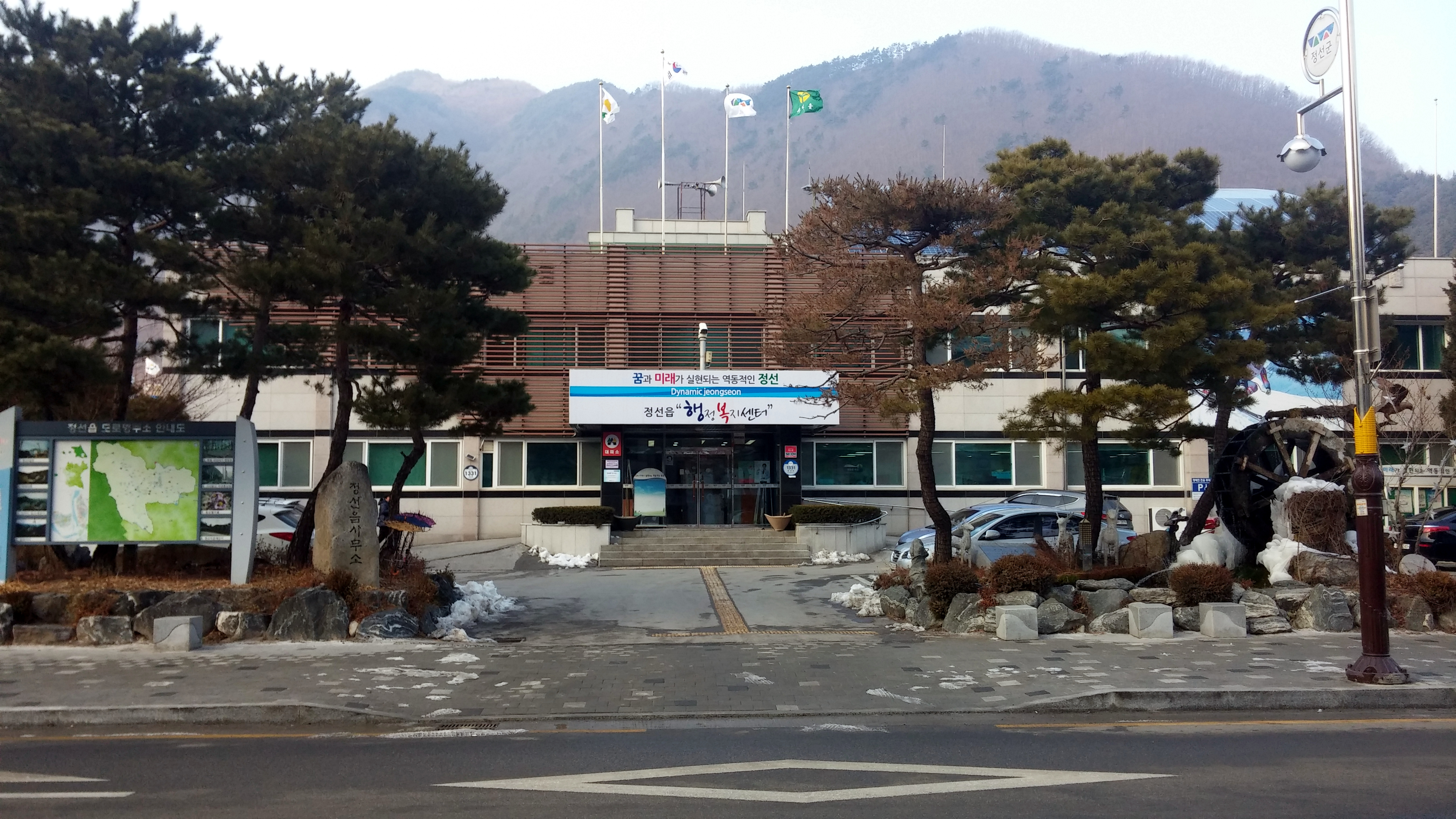 정선읍사무소.